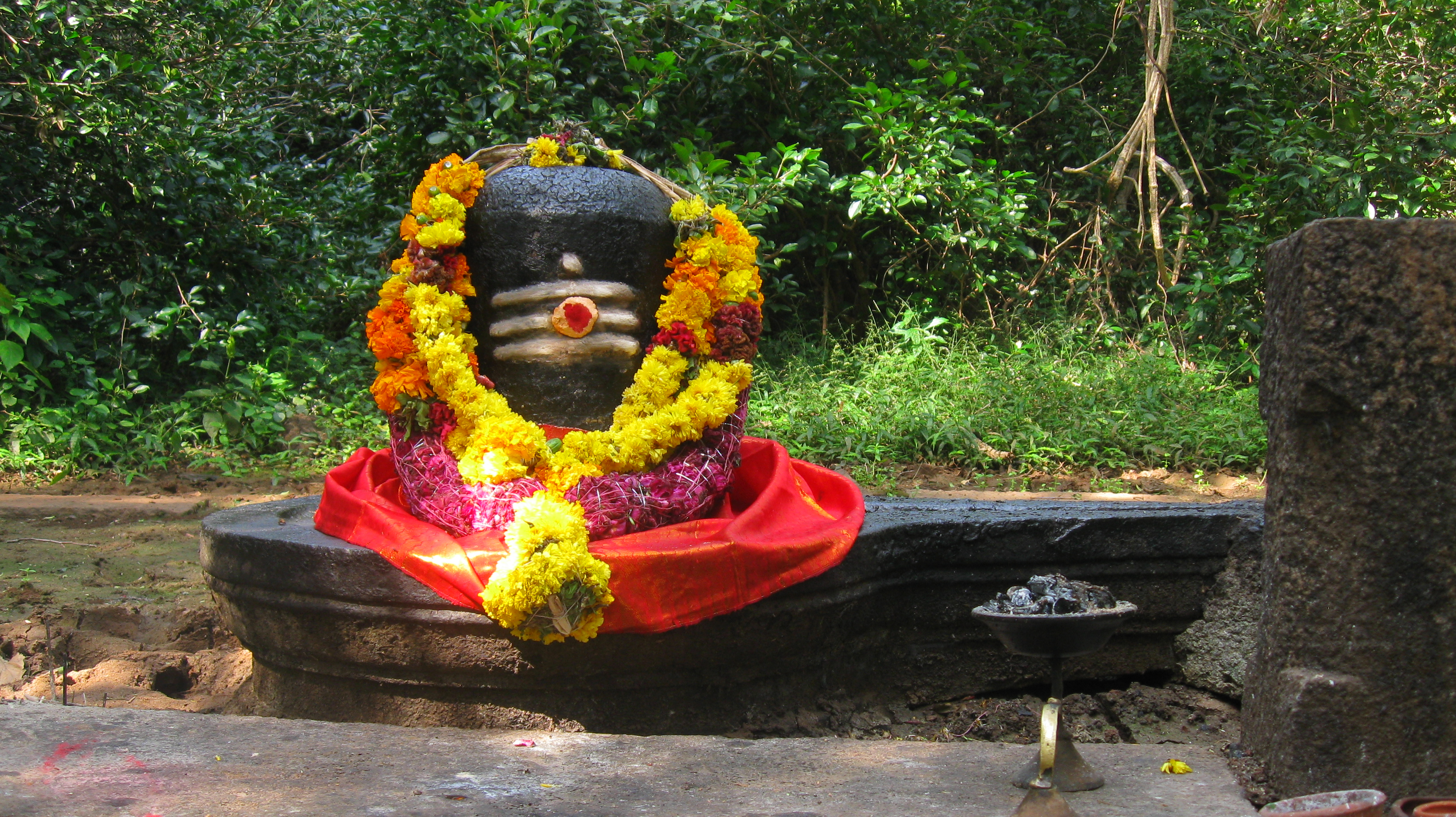 தென்னாடுடையது சிவம் என்பது வழக்குச் சொல். அவ்வகையில் தமிழ்நாடெங்கும் பட்டி தொட்டிகளிலெல்லாம் சிவலிங்கங்கள் மரத்தடியிலும், காடுகளிலும் கூடக் காணப்படும். நாம் காணும் லிங்கம் பறம்புமலை அடிவாரத்தில் உள்ள அழகுசொக்கர் என்ற பெயரில் ஓர் ஊருணிக் கரையில் உள்ளதாகும்.